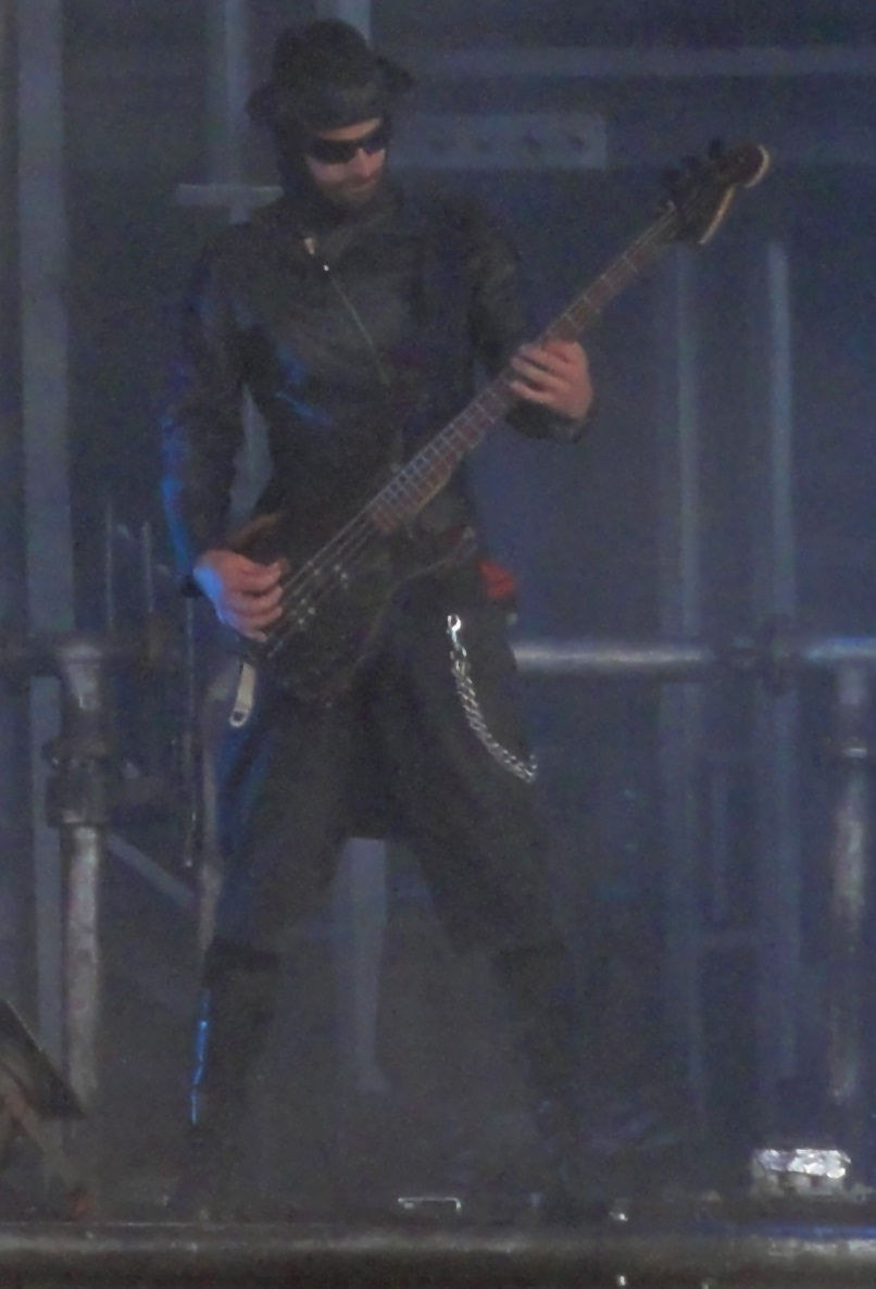 Rammstein